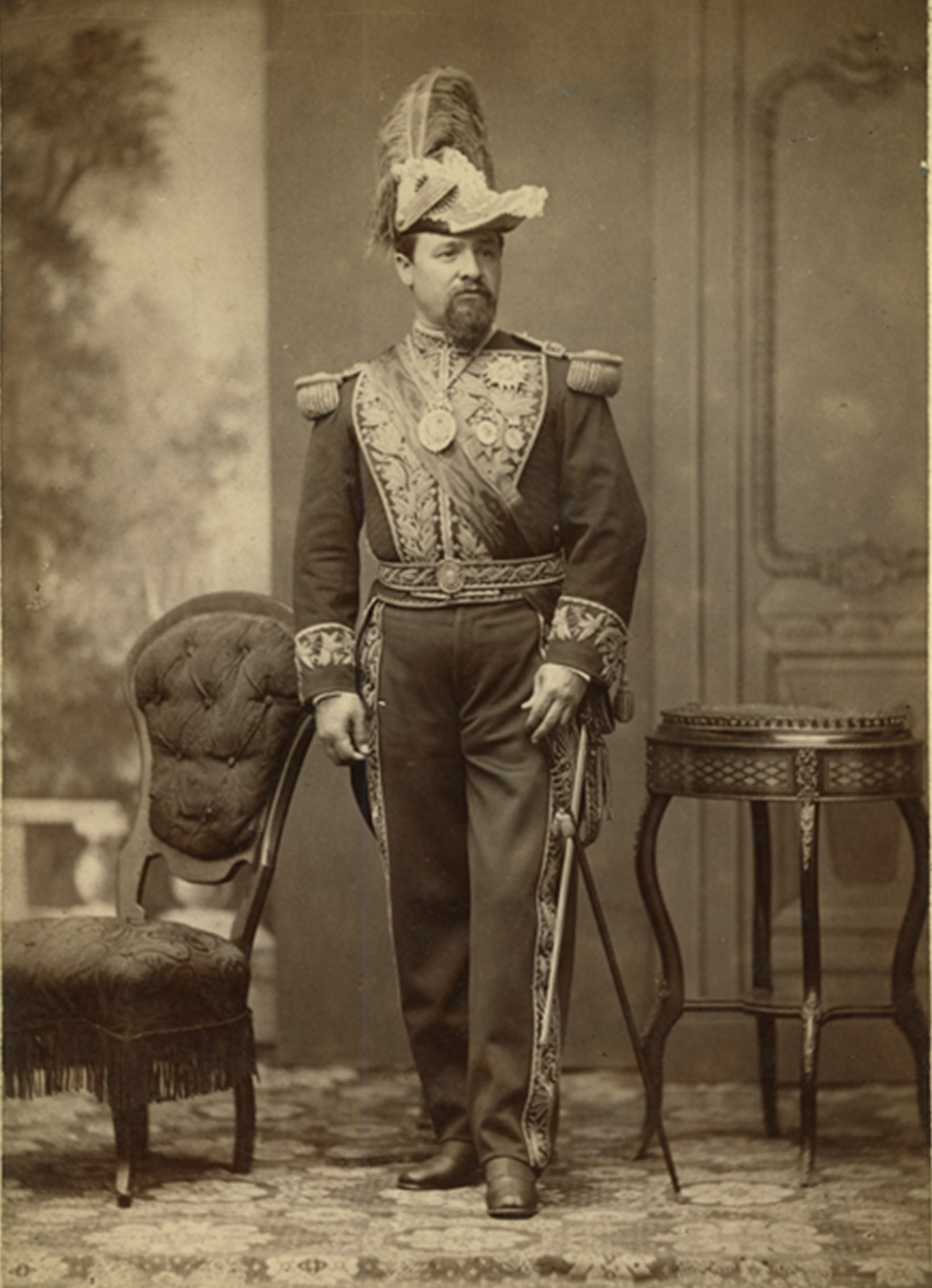 Hilarión Daza Grosselle, militar boliviano, presidente de Bolivia de 1876 a 1879.